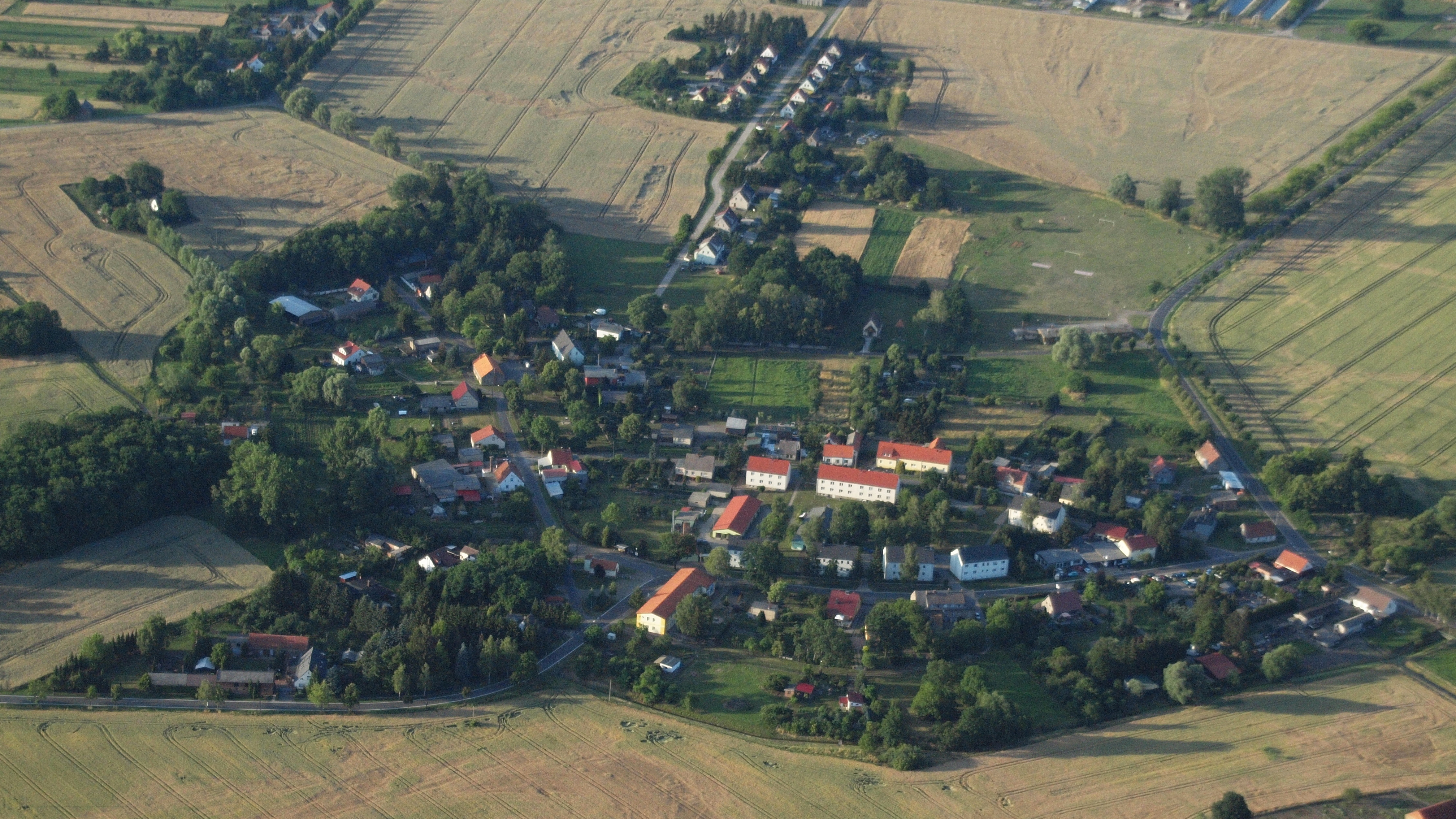 Genschmar, Luftaufnahme (2015)